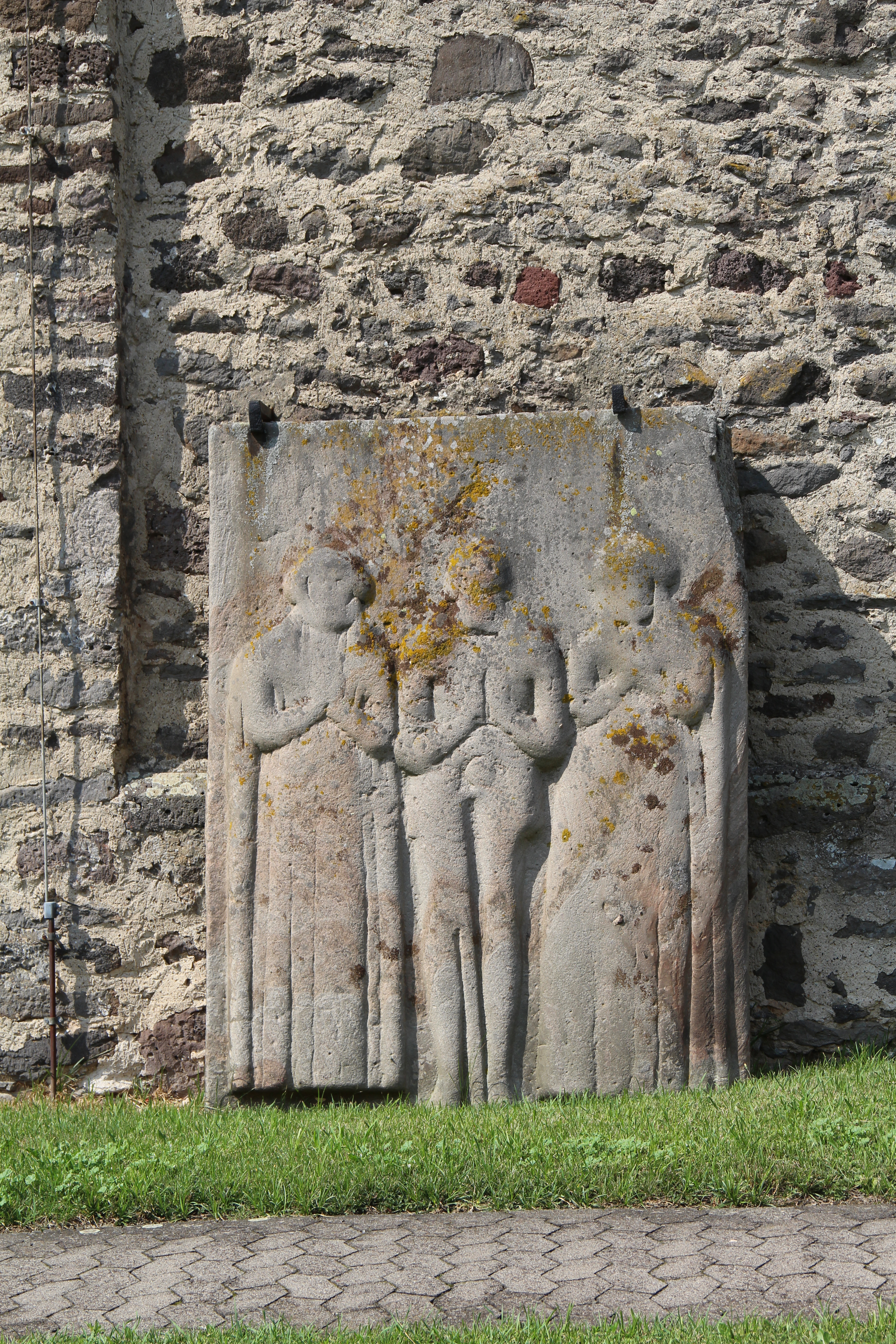 Evangelische Kirche Winnen (Allendorf/Lumda). Steinplatte rechts vom Südportal - Grabplatte für die Freiherren Rau von Holzhausen